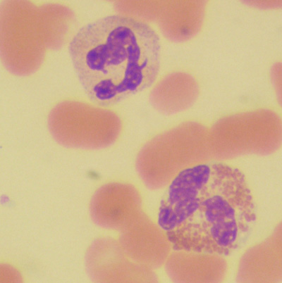 deux granulocytes différents pas leurs colorations des granulations